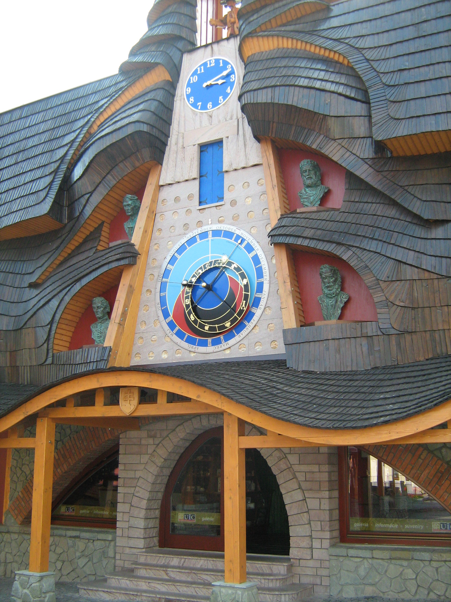 Stará Bystrica, orloj